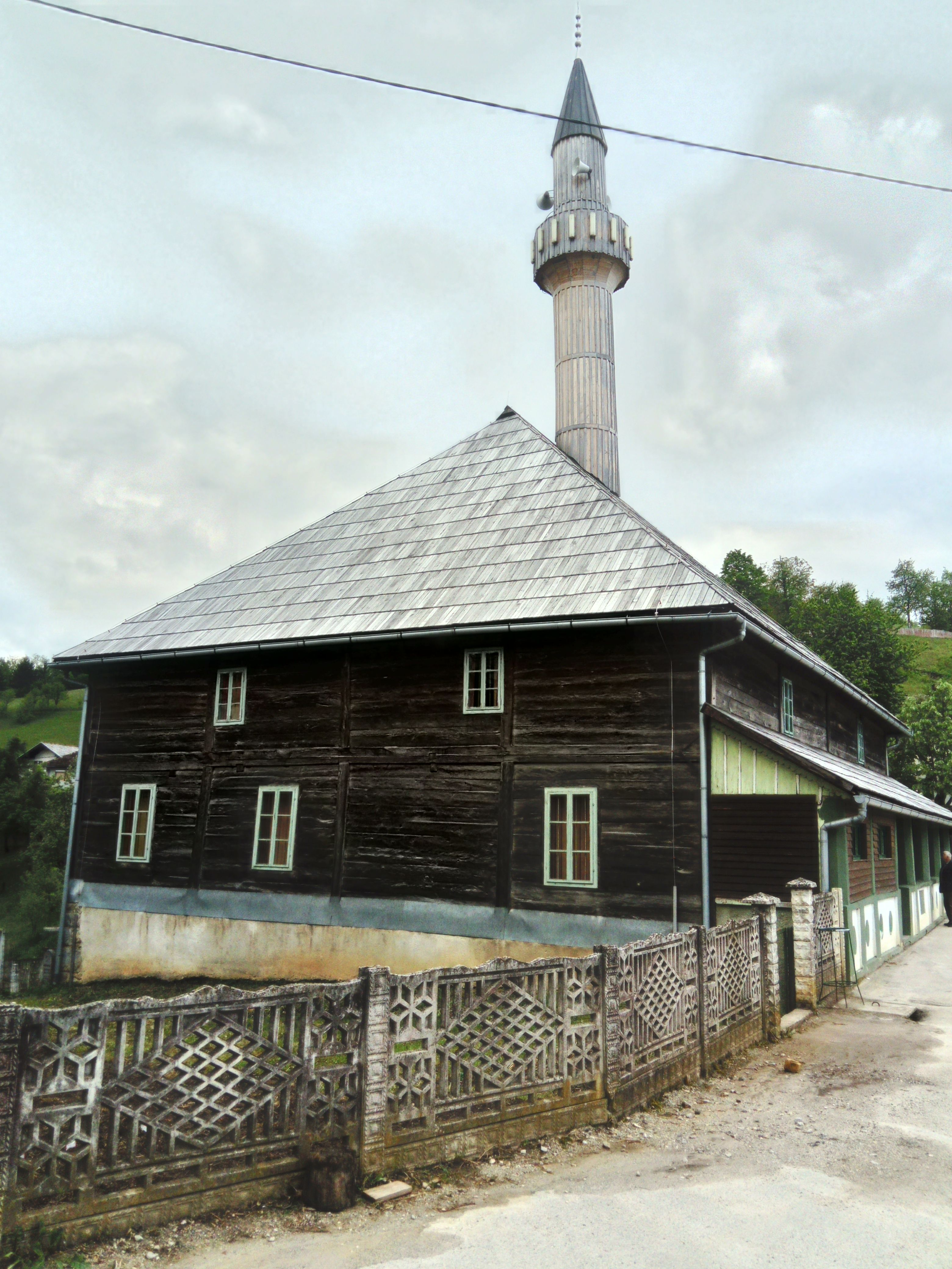 Stara drvena džamija u Bužimu.